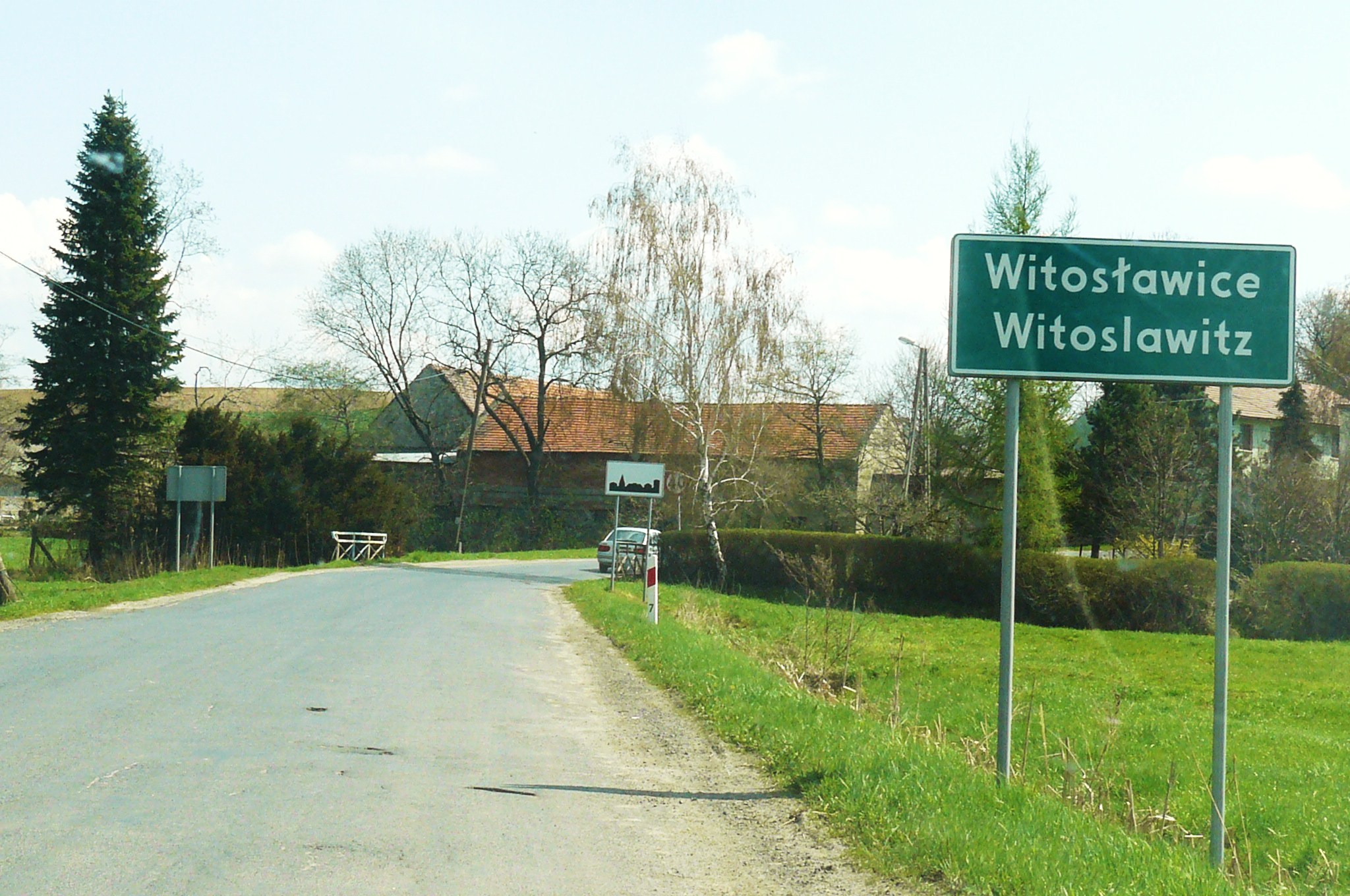 Witosławice - nazwa dwujęzyczna.